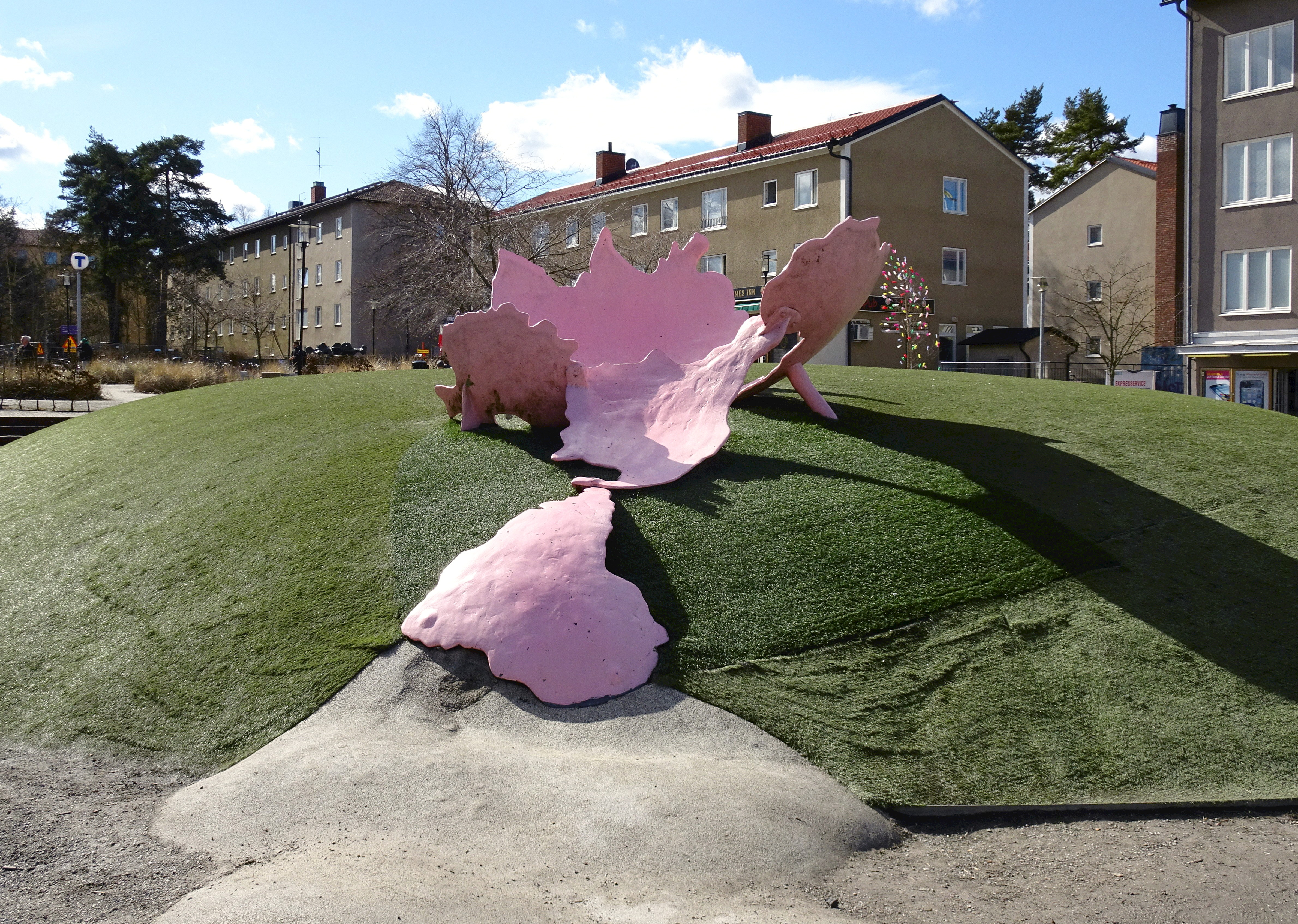 Bagarmossens centrum med Marsipanrosen på prinsesstårtan av Dan Wolgers